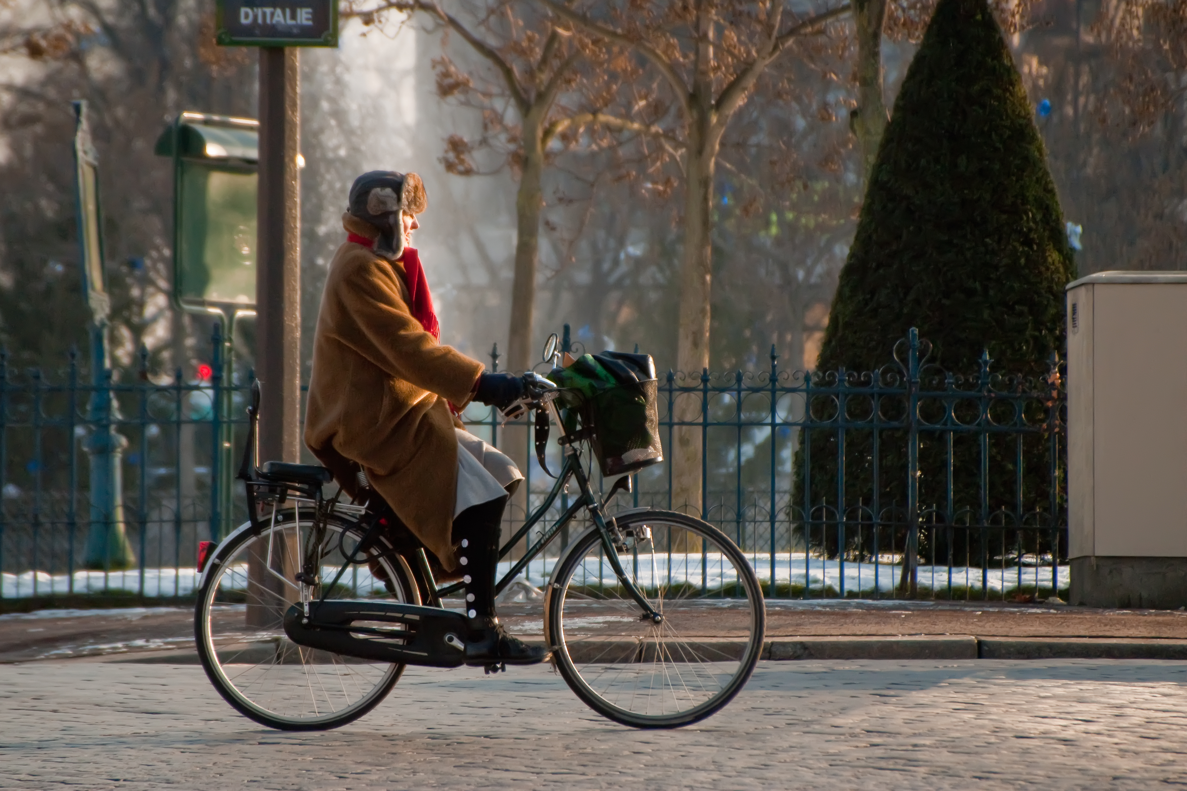 Cycliste sur le pavé de la place d'Italie à Paris, un jour de neige.